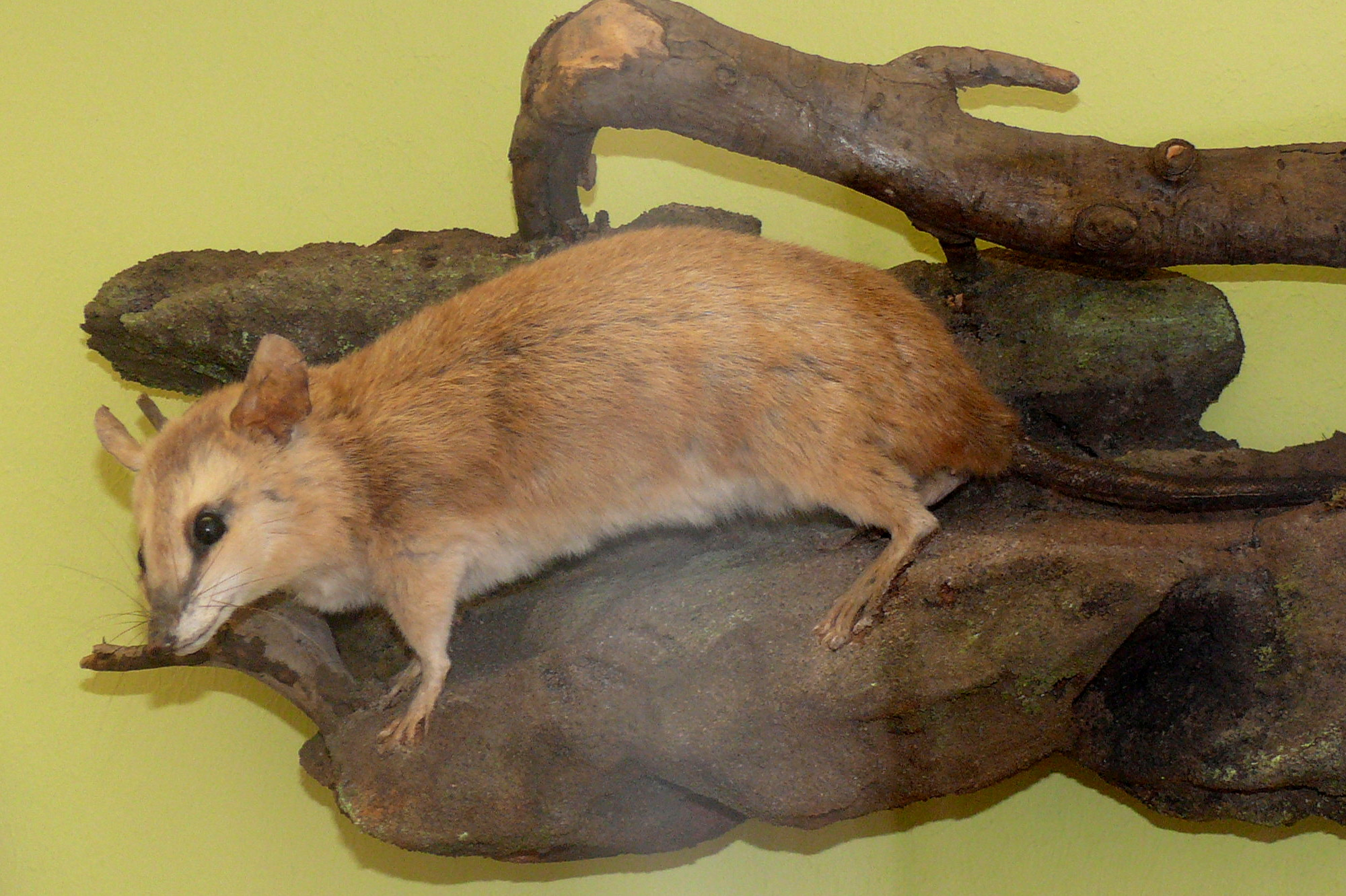 Vieraugen-Opossum (Metachirus nudicaudatus)